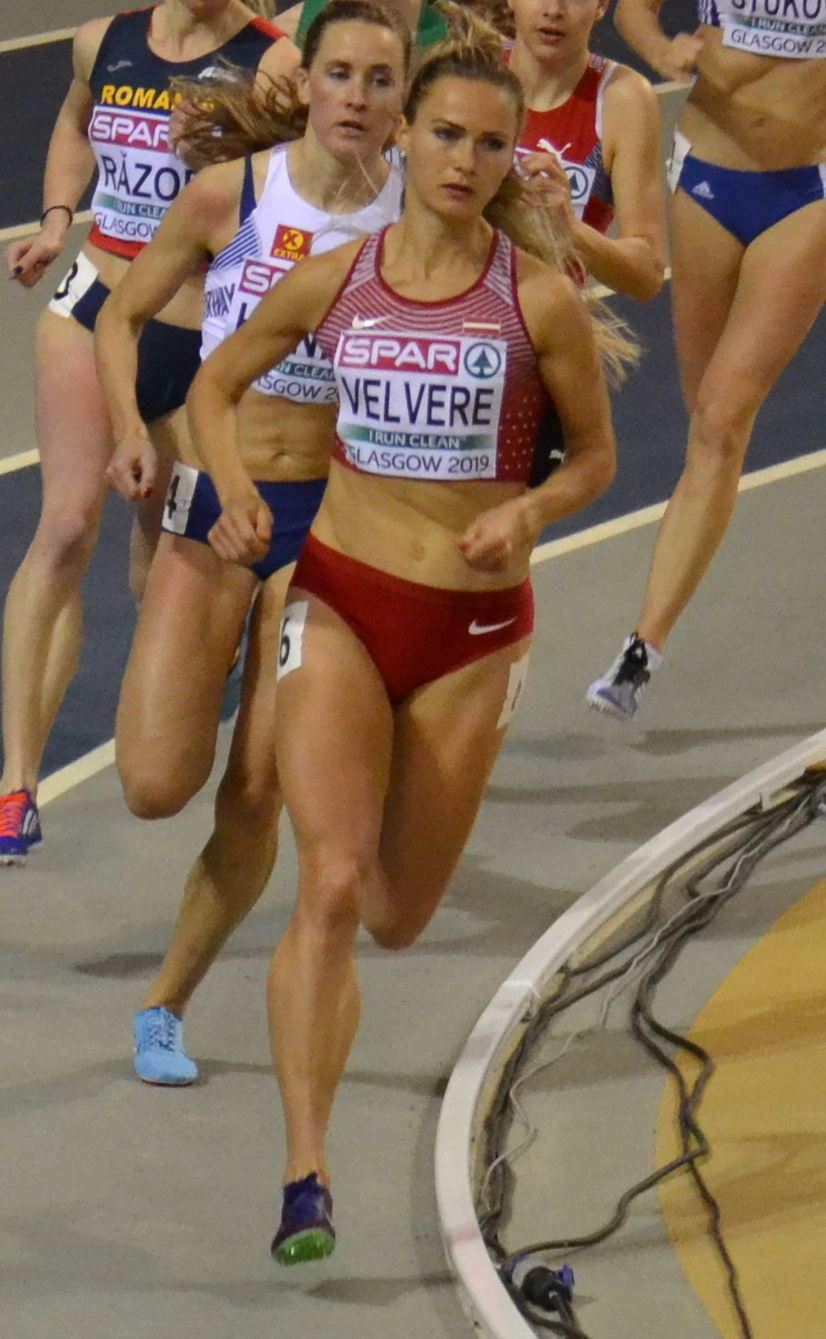 Womens 800m